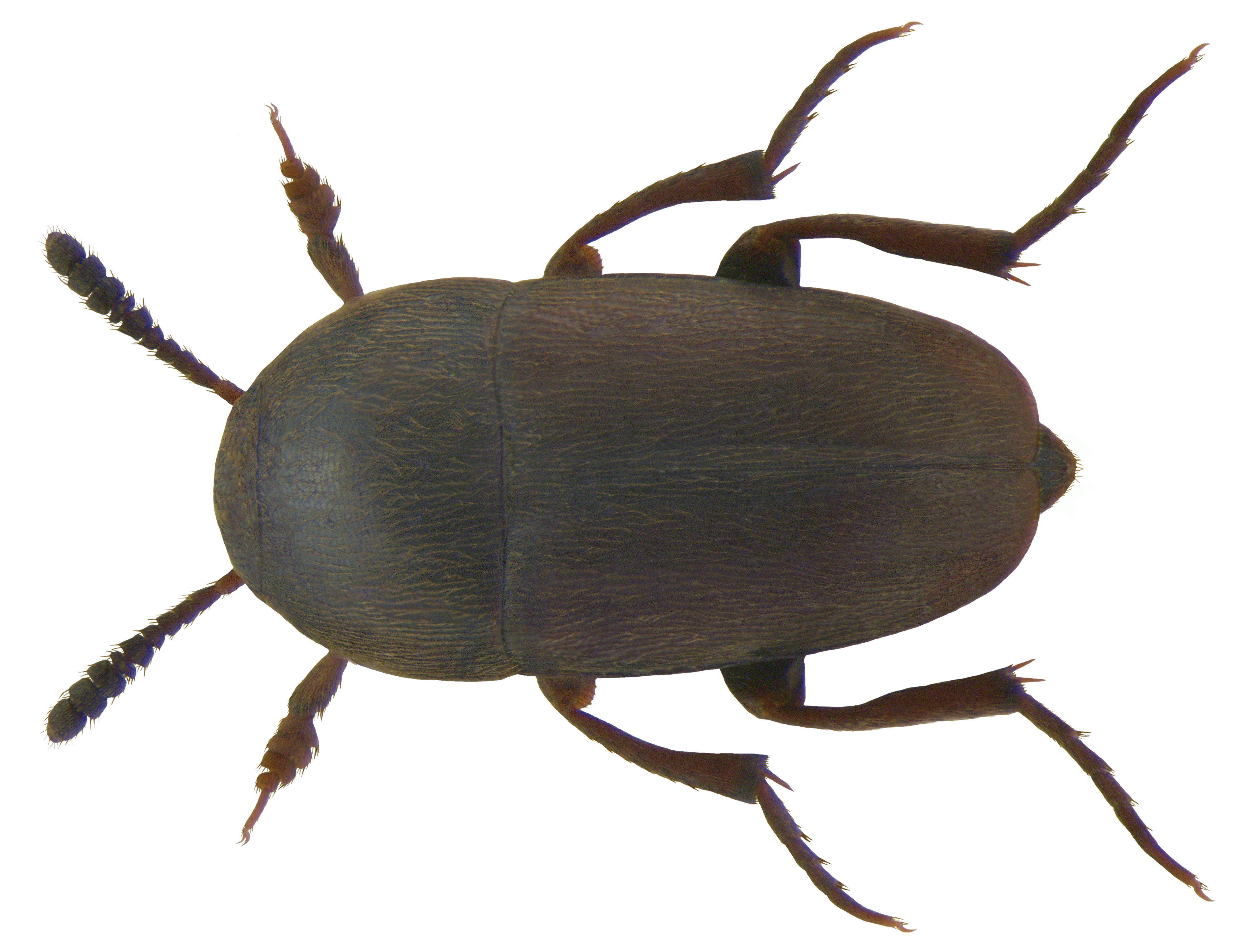 Familie: Cholevidae Grösse: 2,2-3,7 mm Verbreitung: Europa, nicht selten Ökologie: in Säugetiergängen und -nestern, an Kadavern Fundort: Germania Bayern, Oberfranken, Kulmbach leg.det. U.Schmidt, 1984 Foto: U.Schmidt, 2009